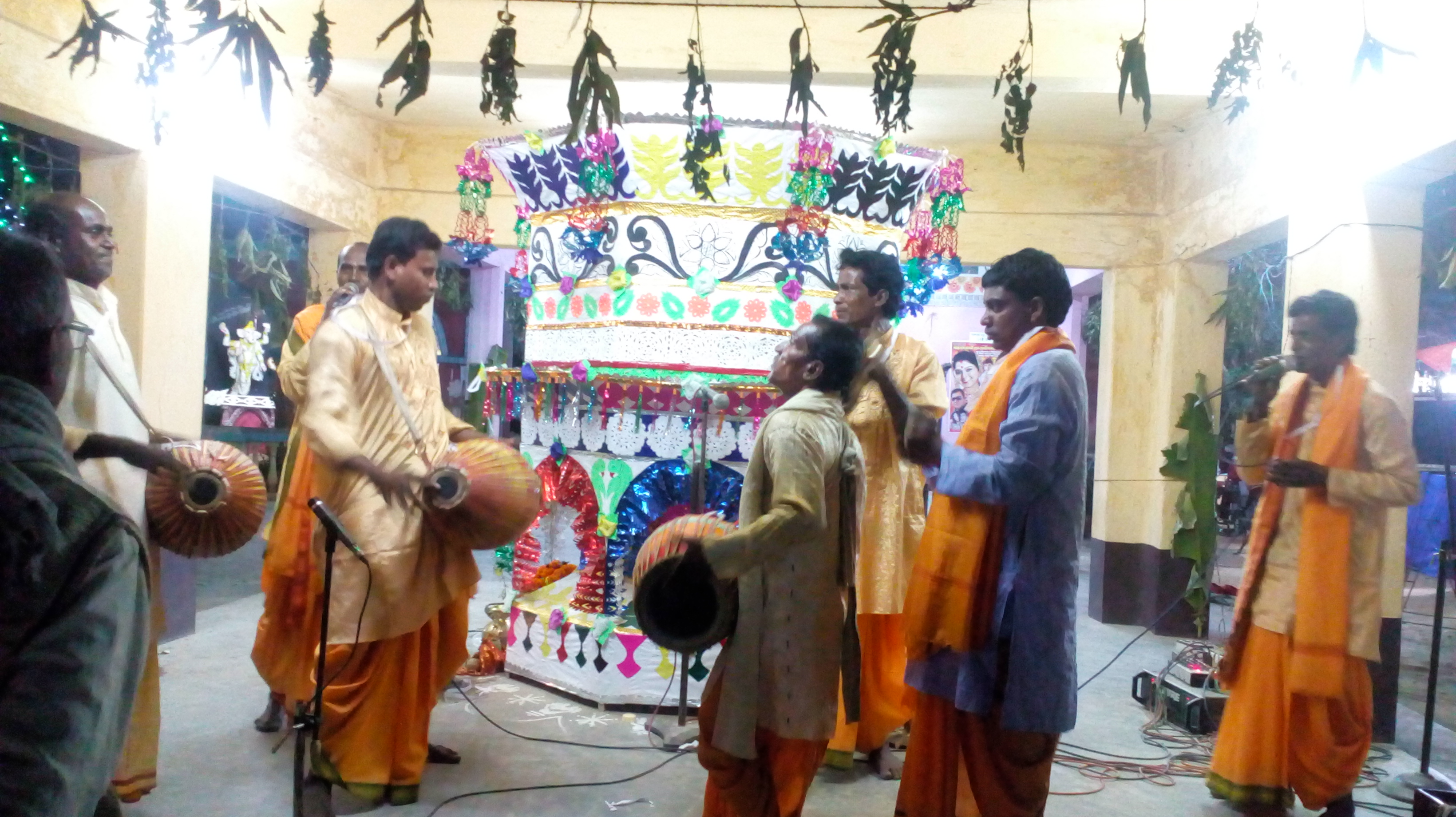 এটা হল 'কীর্তন' বা 'নাম-সংকীর্তন'। এটি হল ভারতবর্ষের বিশেষত পশ্চিমবঙ্গের একটি অন্যতম ধর্মীয় অনুষ্ঠান। ভগবান শ্রীকৃষ্ণের আরাধনা করা হয় এই কীর্তনের মাধ্যমে। This photo has been taken in the country: India